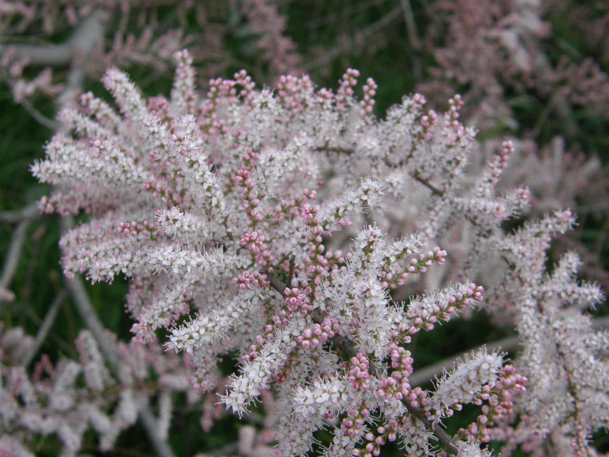 Растение